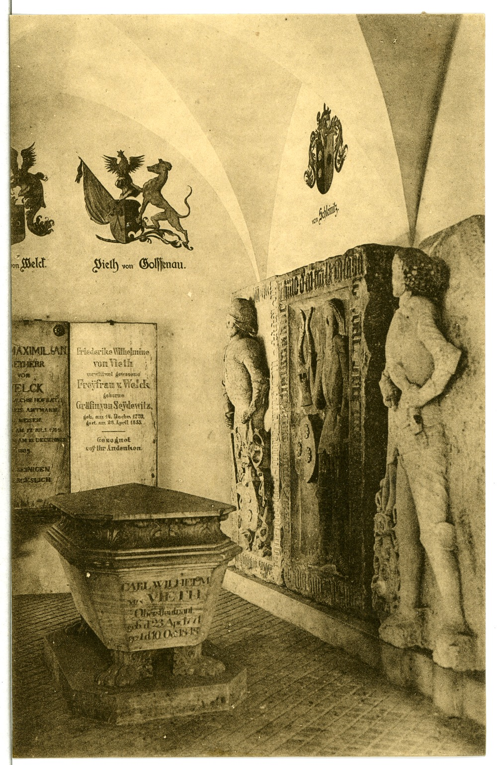 Meißen; Grabmal in den Kreuzgängen des Franziskaner-Klosters This postcard is from publisher Brück & Sohn in Meißen ( This postcard has a unique number 12594 and is available in a higher resolution at the publisher. This images was uploaded in a cooperation project between Wikipedians and the publisher.